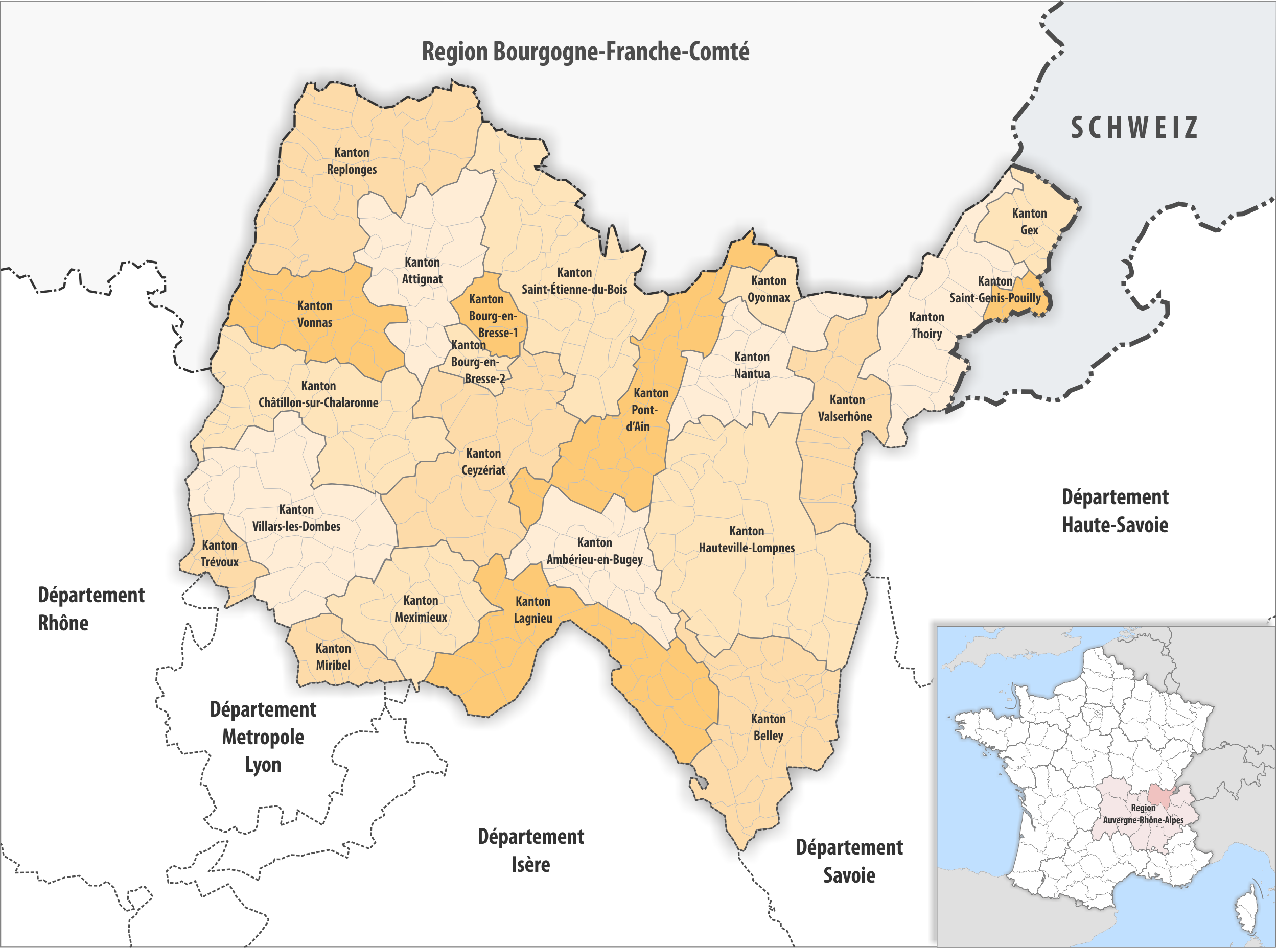 Gemeinden und Kantone im Departement Ain